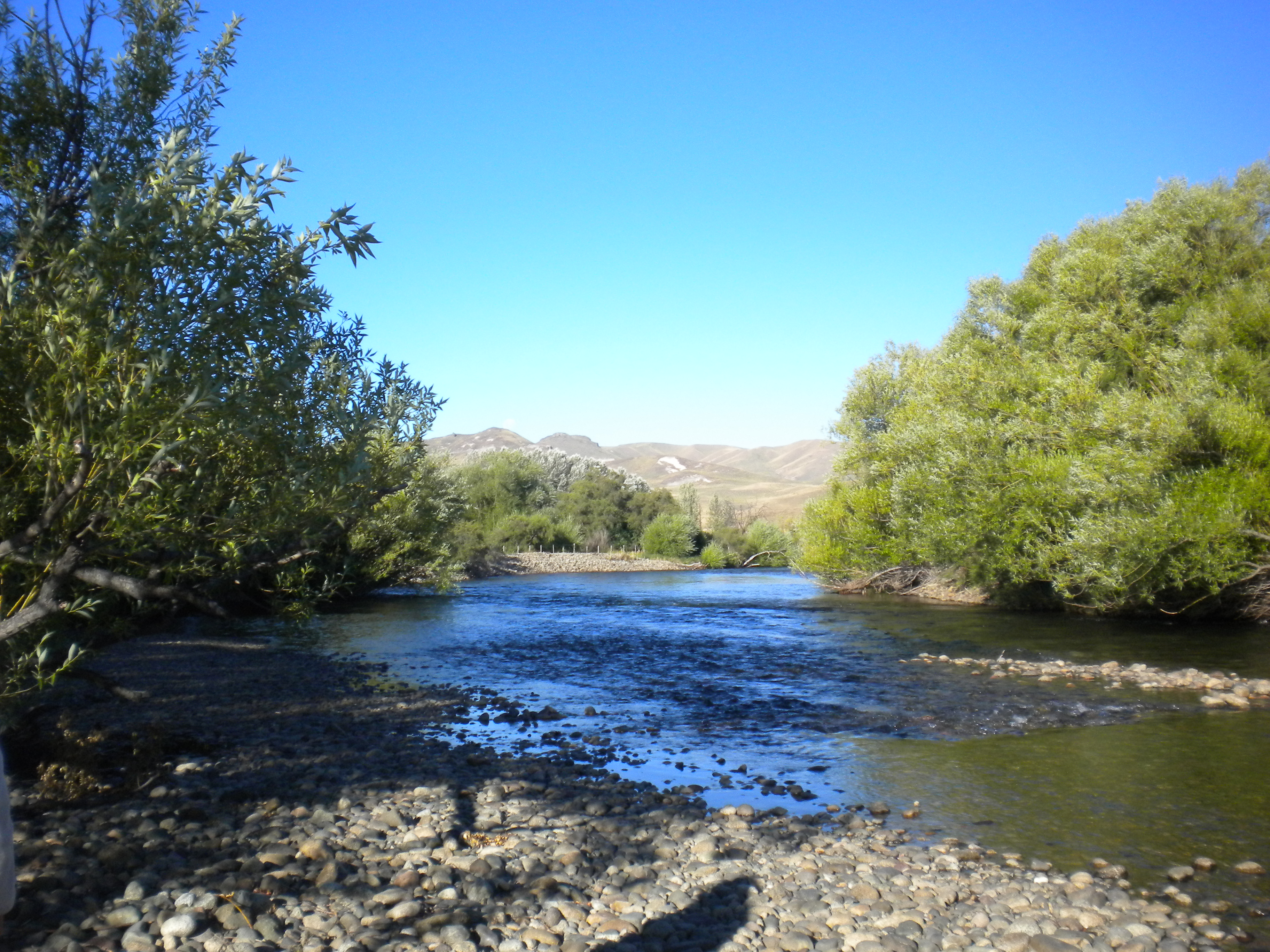 Junin de los andes